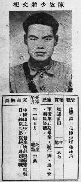 抗戰軍人忠烈錄第一輯中的烈士遺像